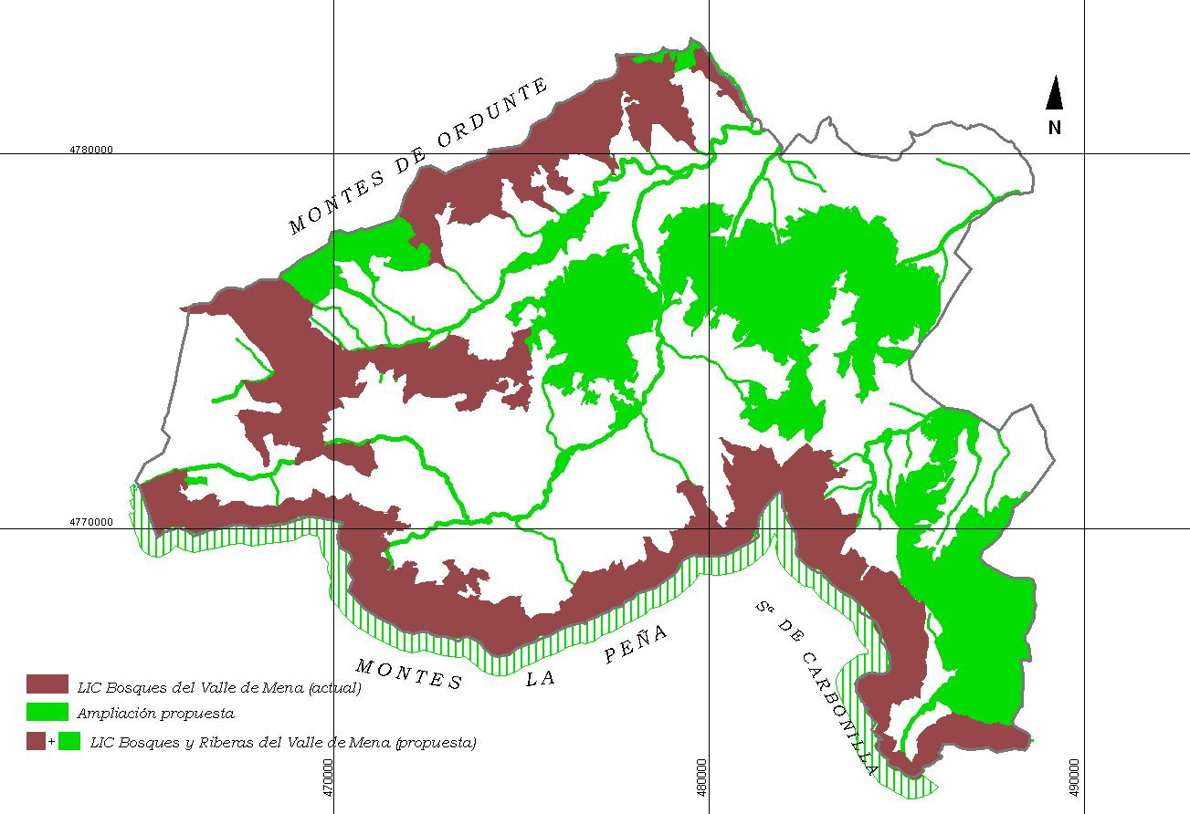 Mapa de la solicitud de ampliación del LIC Bosques del Valle de Mena.